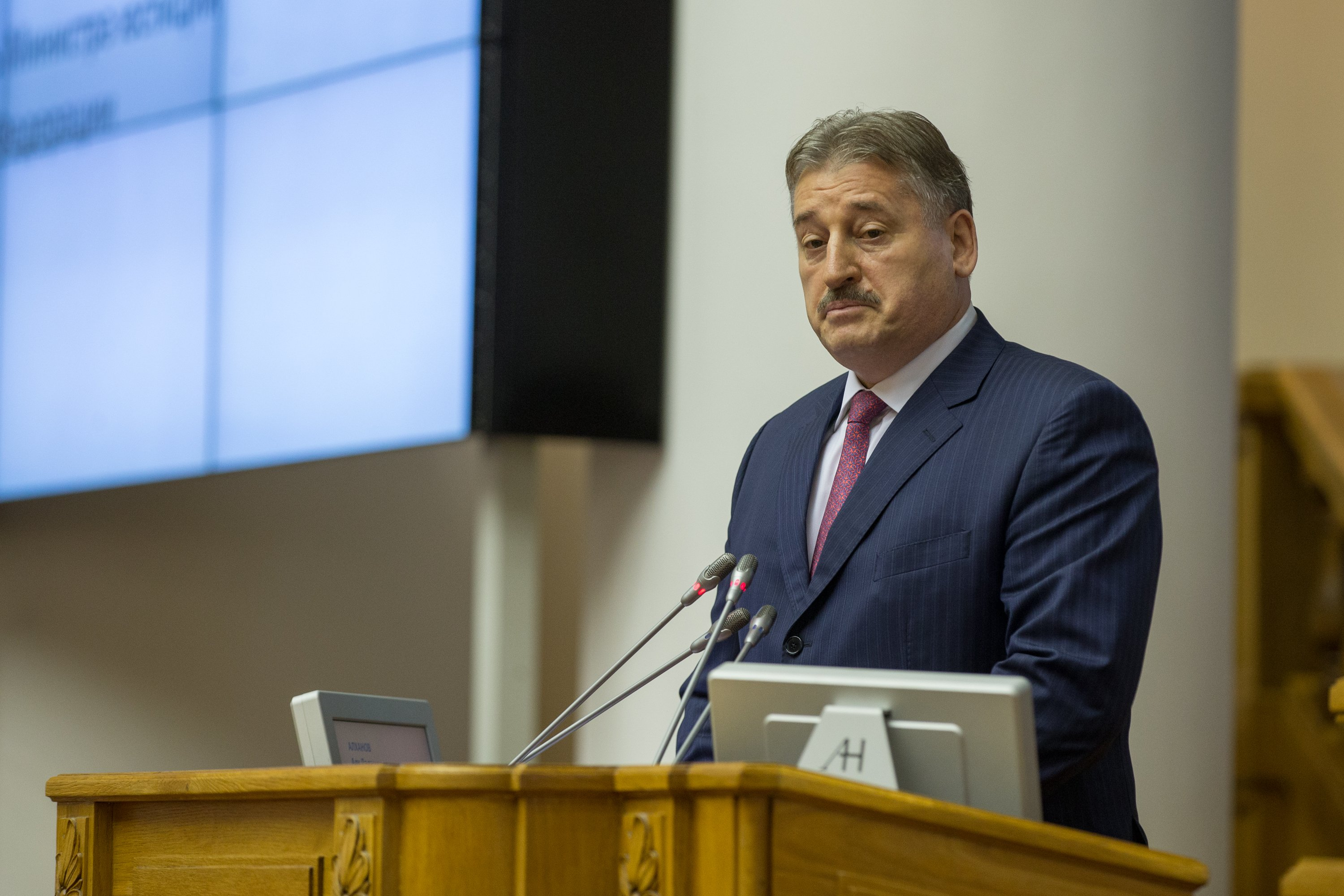 Выступление Заместителя Министра юстиции Российской Федерации Алу Алханова на заседании Совета законодателей 2016 г.